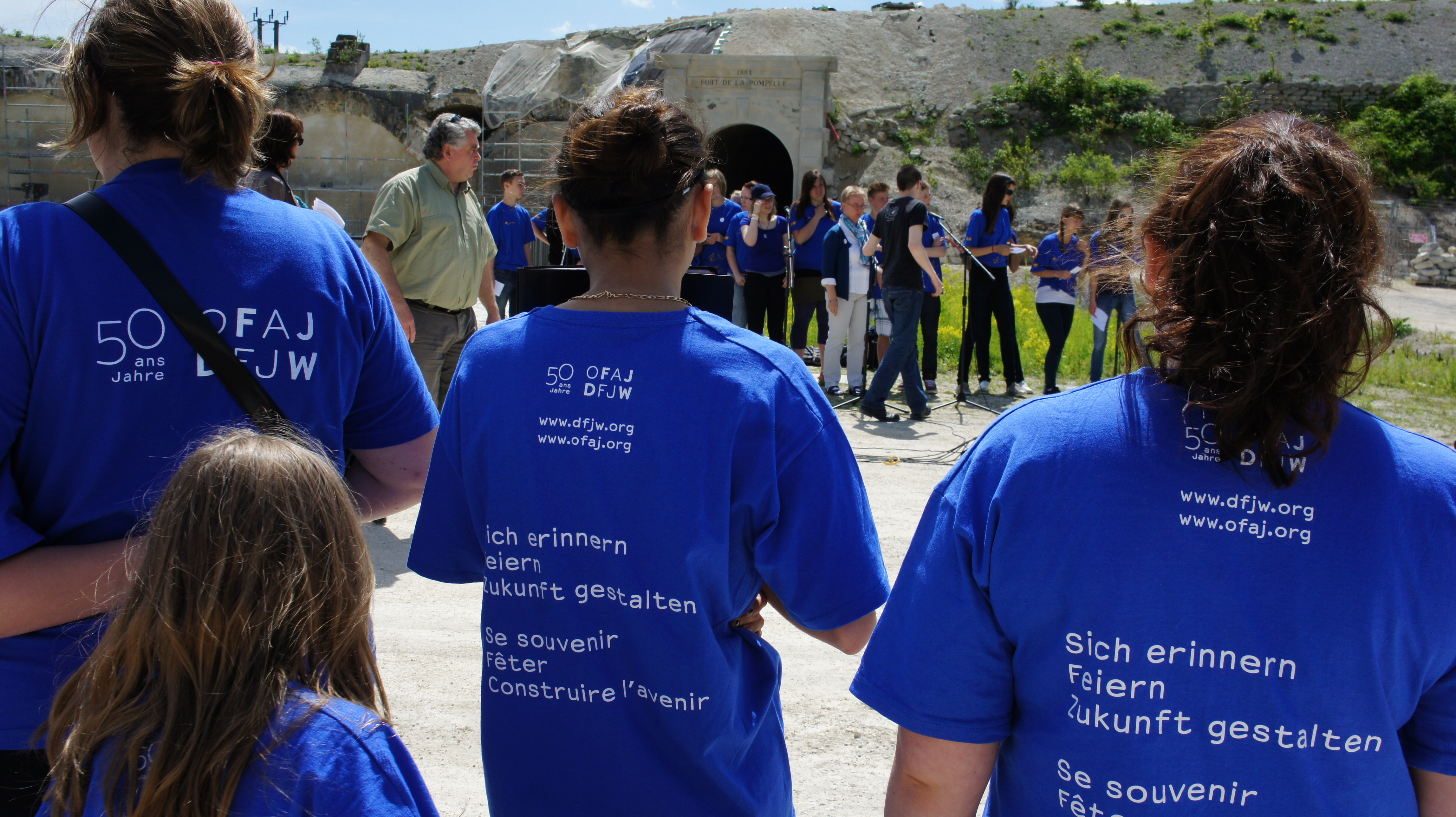 Lecture de lettres de soldats par des élèves d'Aix-la-Chapelle pour les 50 ans de l'Entente franco-allemande .